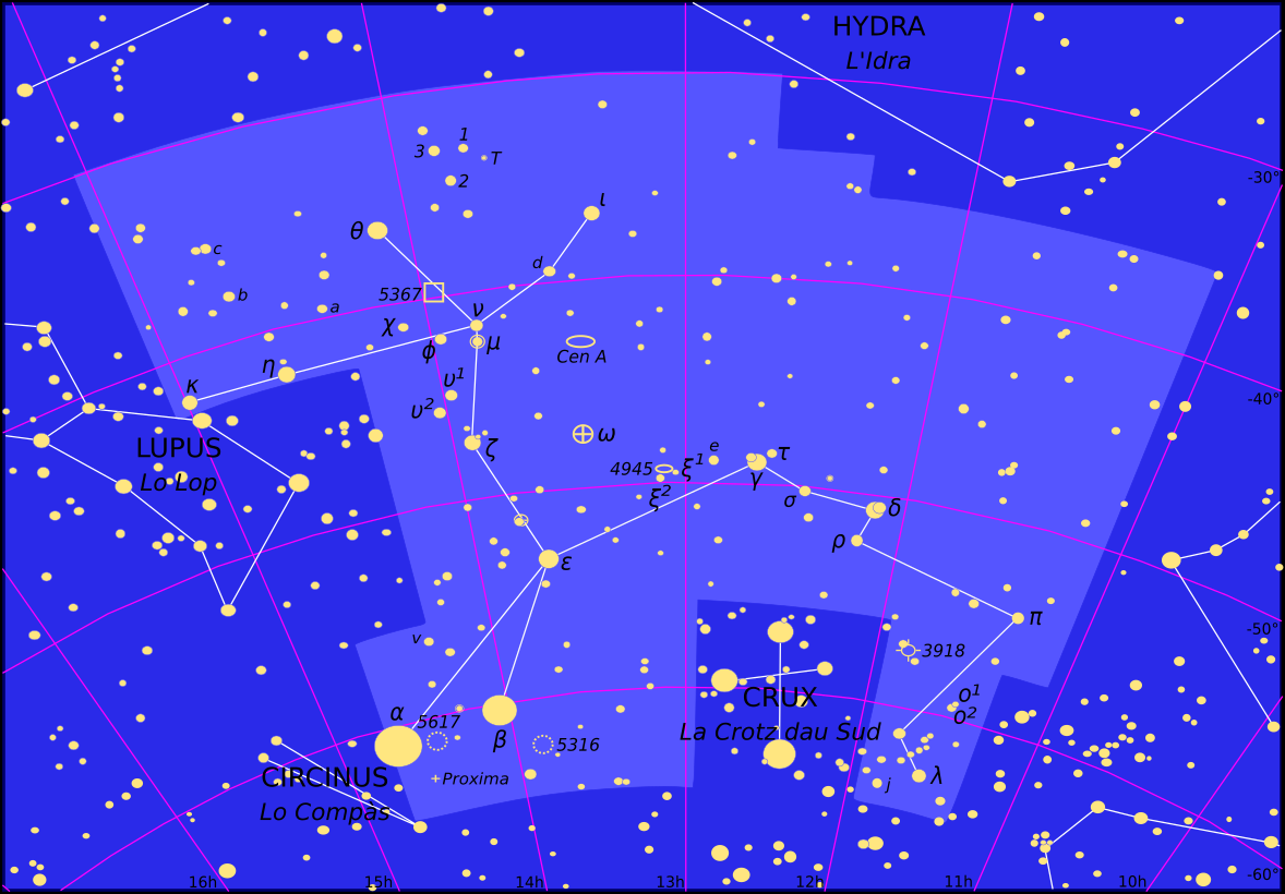 Constellacion dau Centauri.